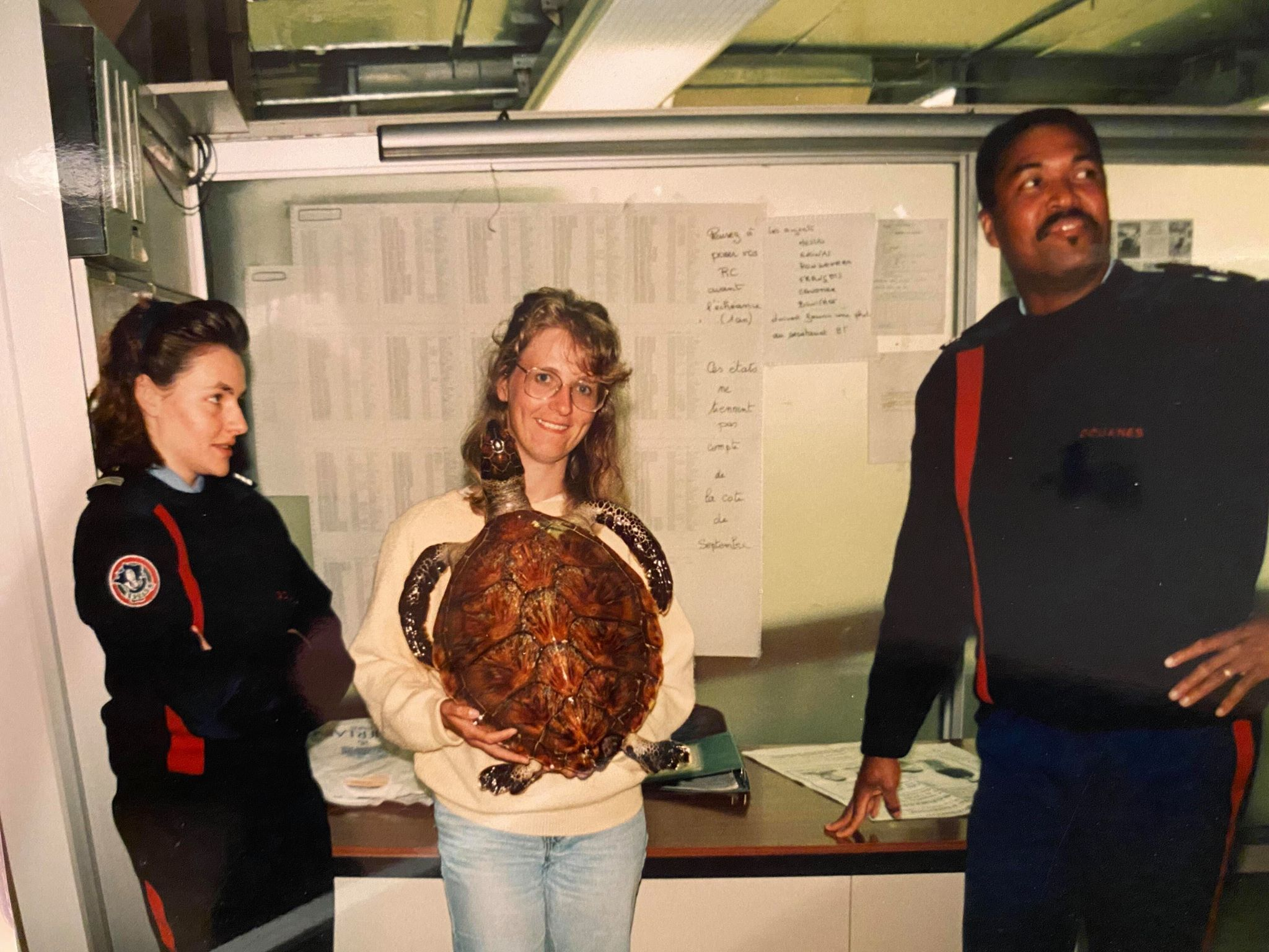 Saisie d'une tortue imbriquée en provenance de l'ile Maurice , Douane d'Orly 1995